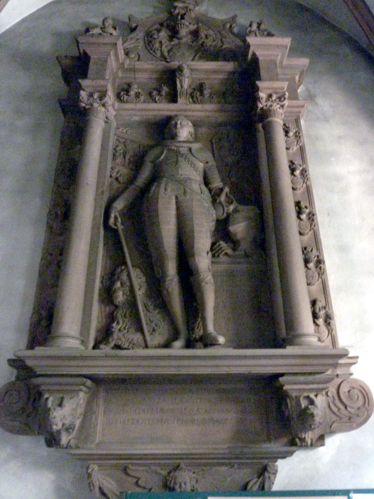 Grabmal Johann Walter von Kerpen (* um 1602; † 6. Februar 1627 in Aschaffenburg) in der Stadtkirche Lohr am Main